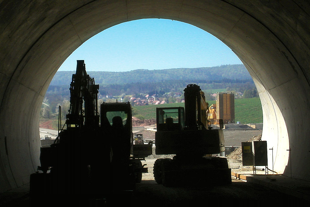 A71 Eichelbergtunnel Südportal, im Hintergrund Wölfershausen